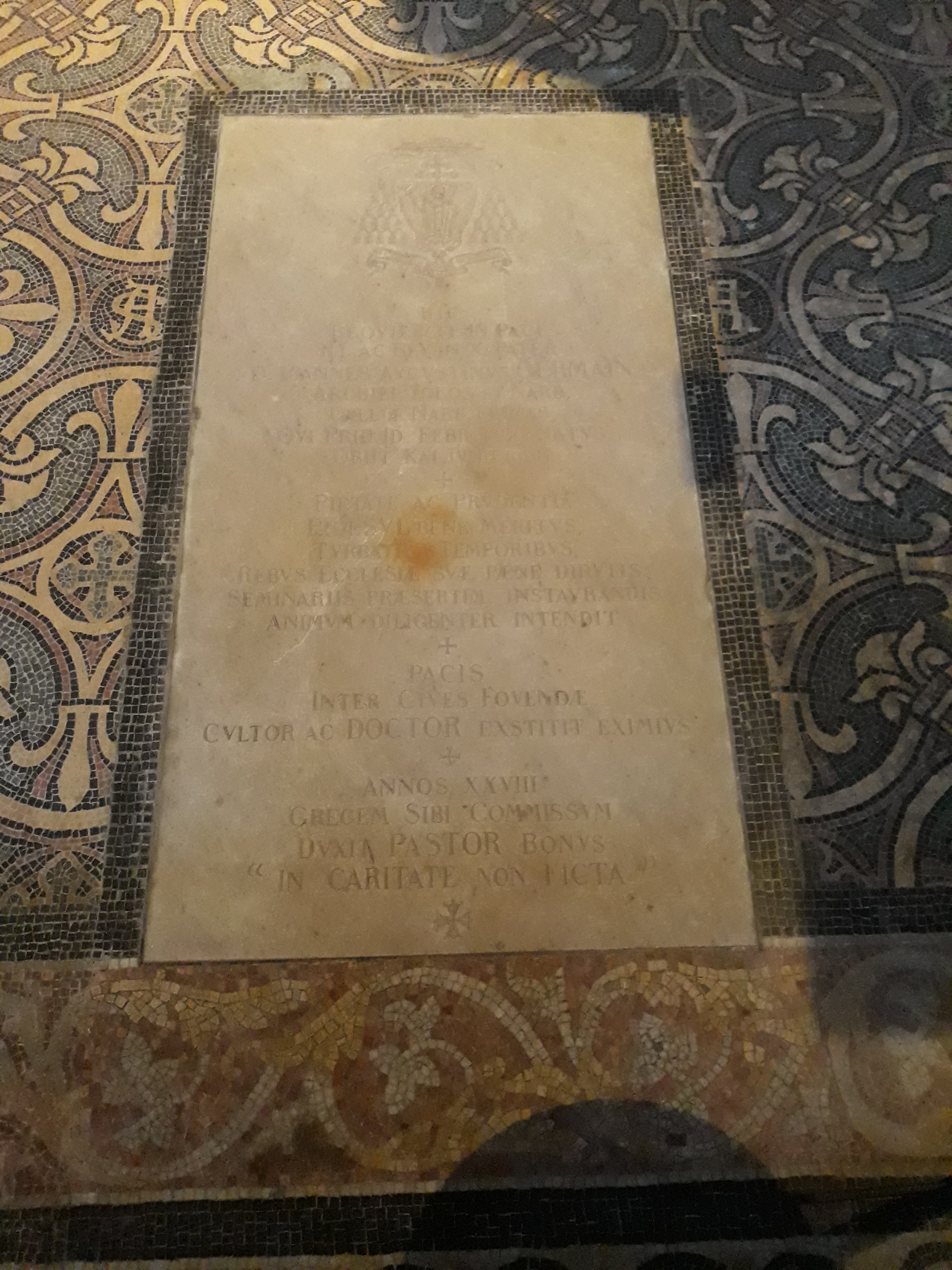 Das Grab des Erzbischofs von Toulouse Jean-Augustin Germain in der Kathedrale von Toulouse.